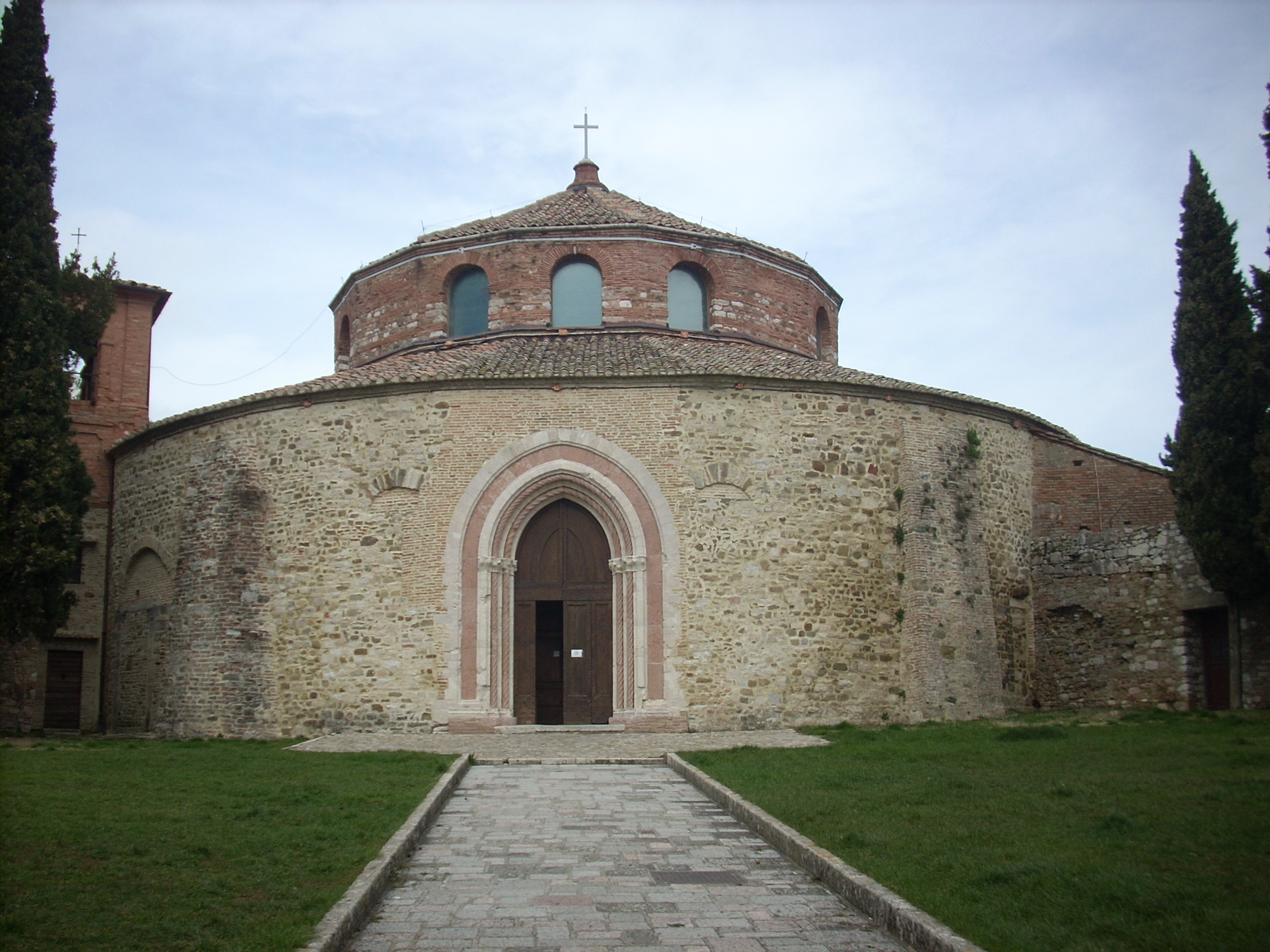 Tempietto di Sant'Angelo